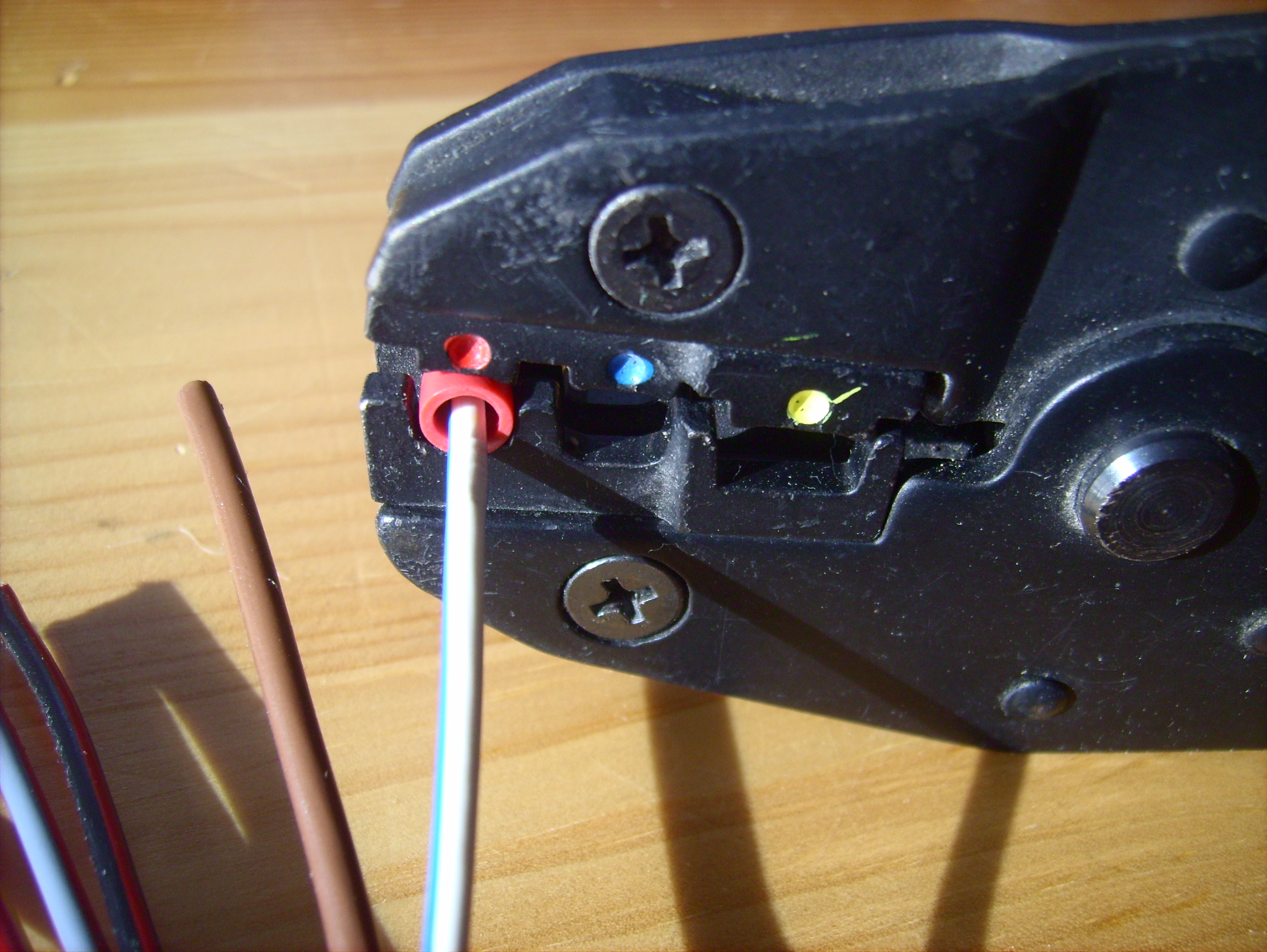 Detailfoto einer Crimpzange mit eingelegtem isolierten Kabelschuh (Farbkennung rot) während des Crimpvorgangs